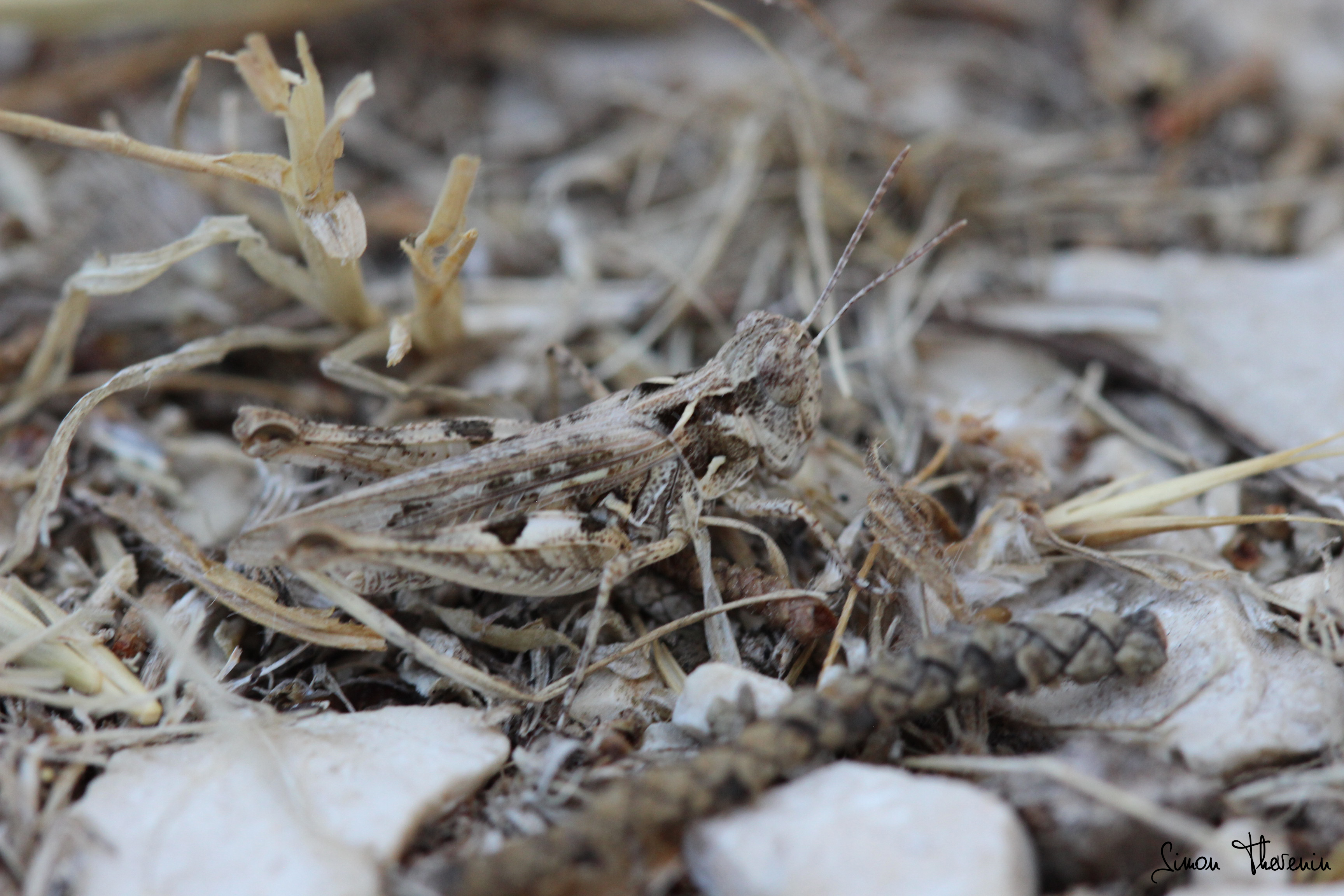 Macrophotographie de l'espèce Dociostaurus jagoi (Criquet de Jago) en camouflage, prise à Marseille